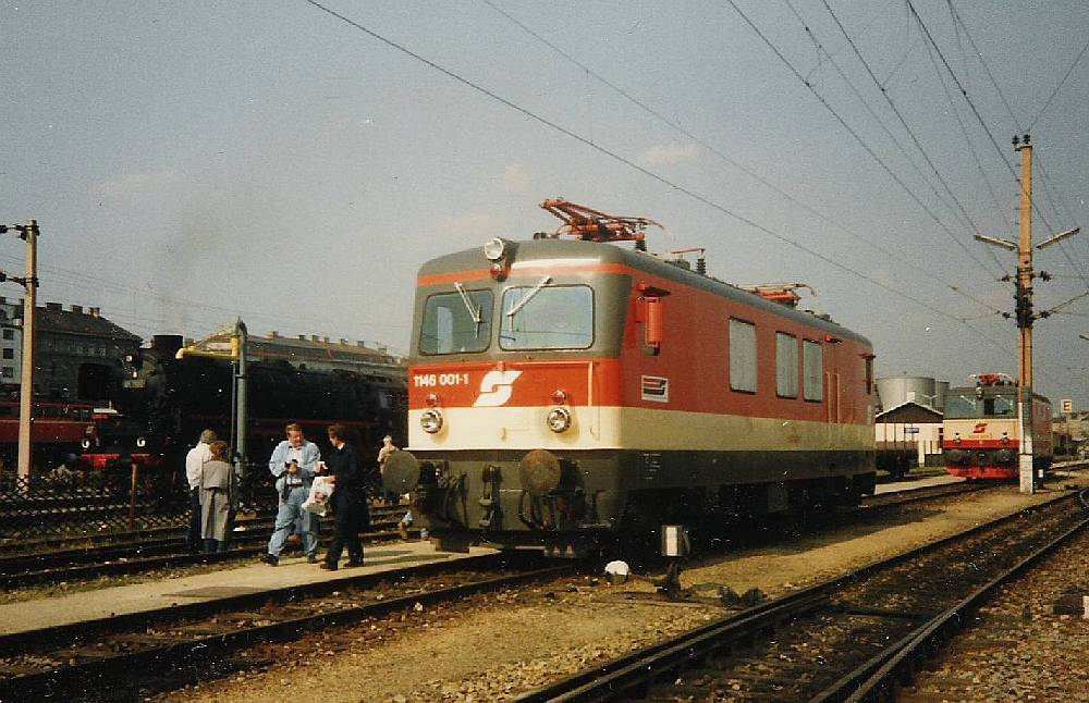 ÖBB 1146 Wien Nordbahnhof